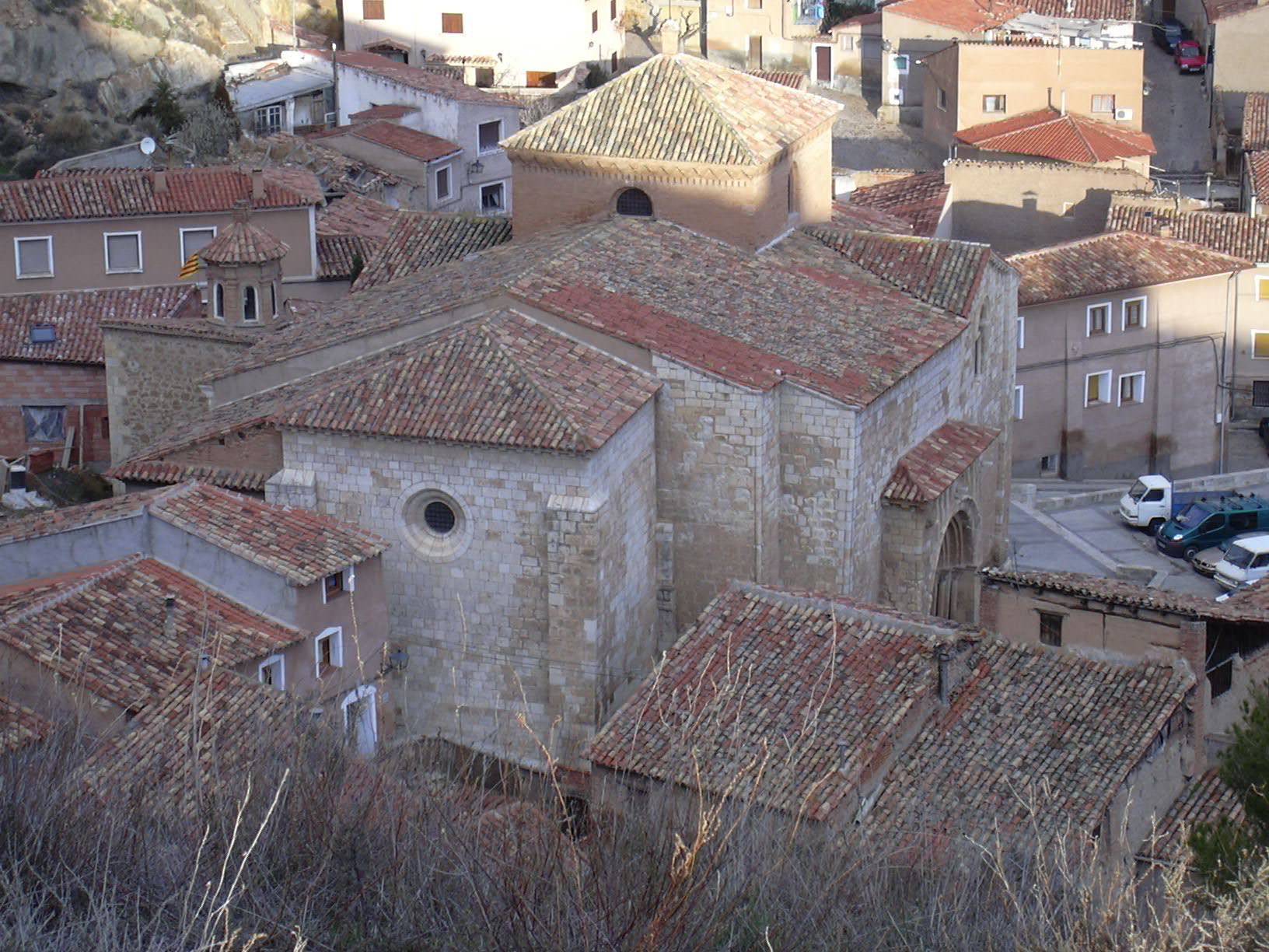 Daroca Iglesia románica de San Miguel